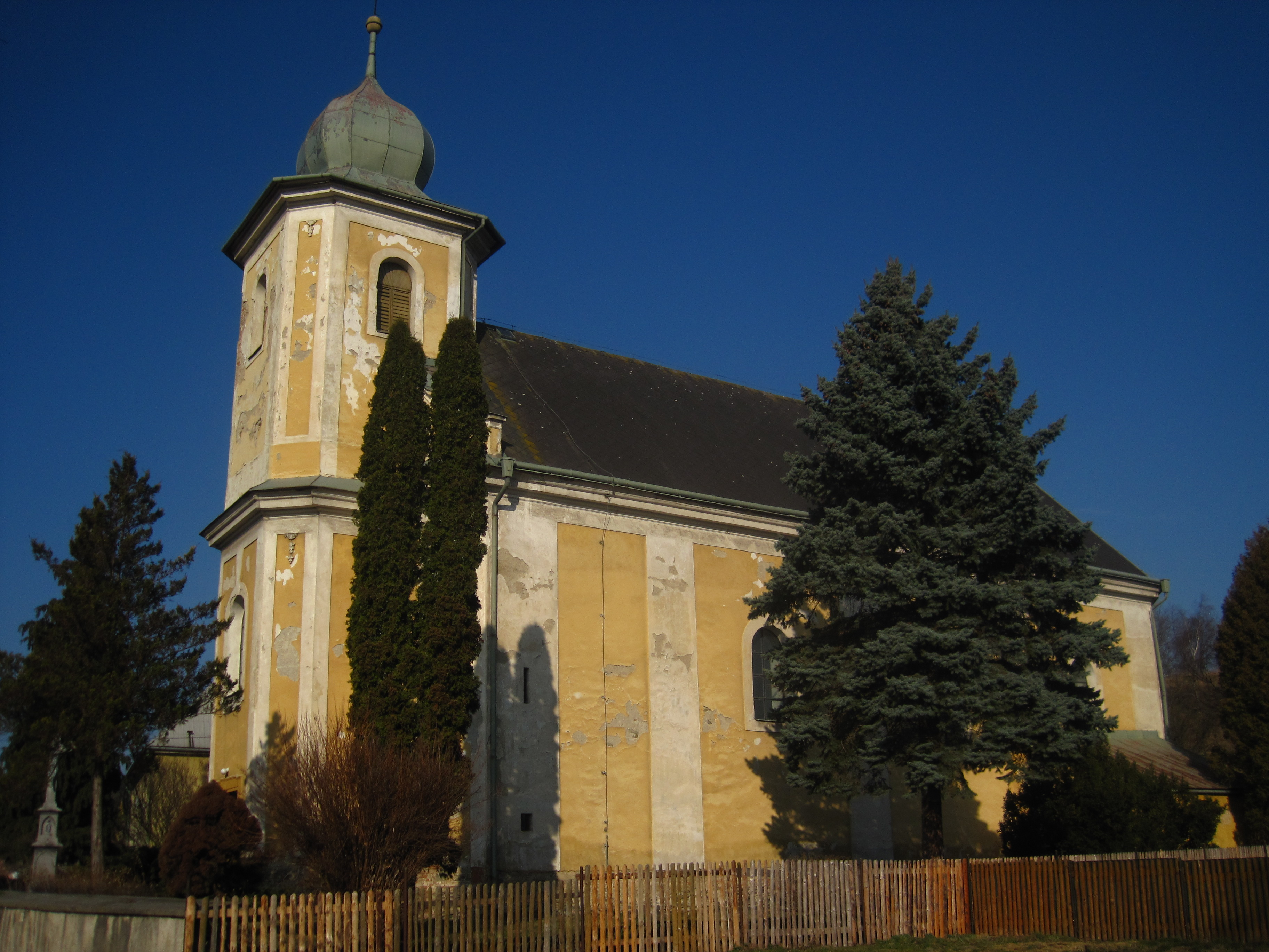 Kostel Narození Panny Marie, Jakartovice.